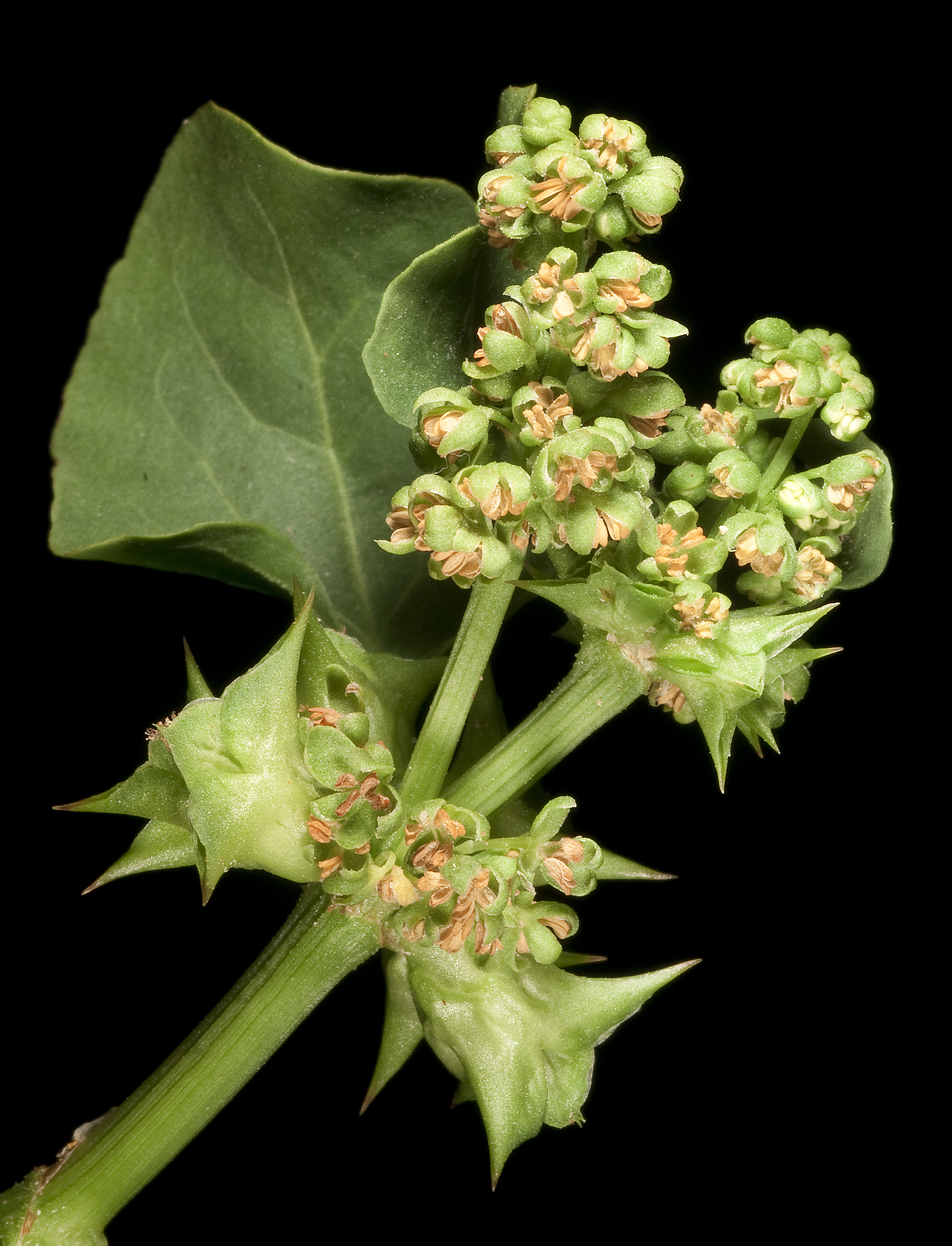 KRT4270